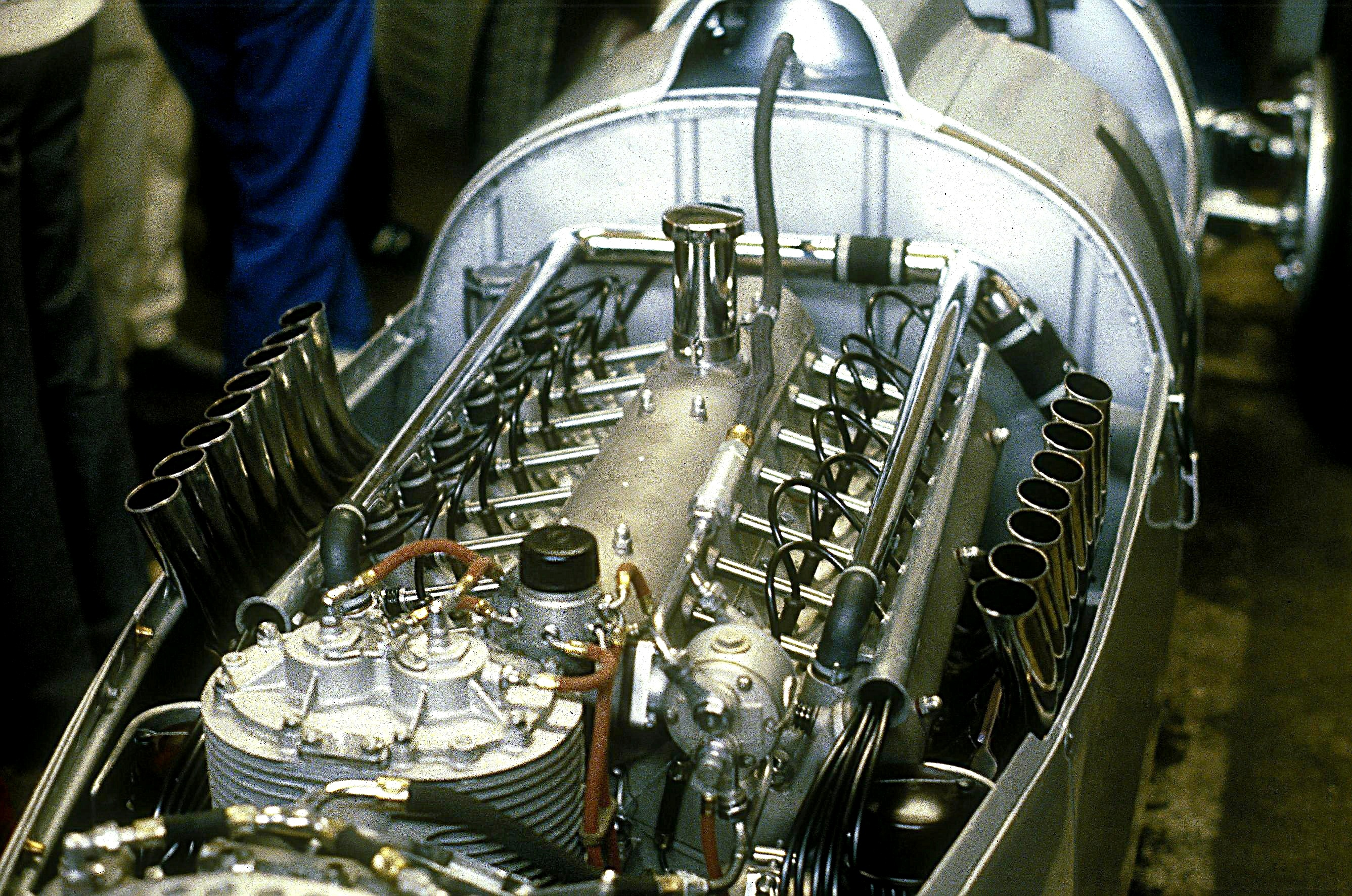 Bildbeschreibung: Auto Union Typ C - 16-Zylinder-Motor Fotograf: Lothar Spurzem Datum: 16.08.1980 im Fahrerlager des Nürburgrings